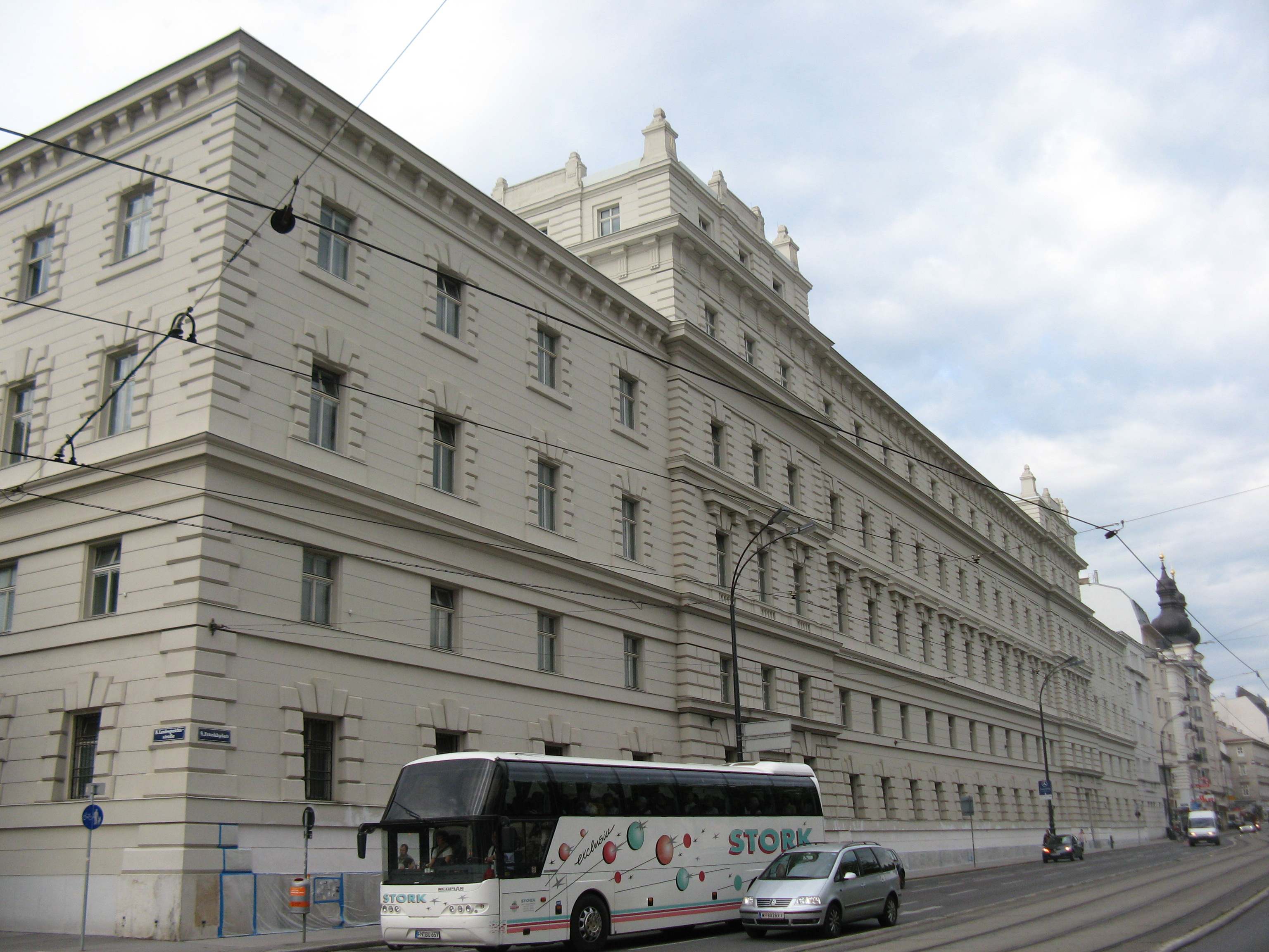 Landesgericht (1831-39) von Johann Fischer, Landesgerichtsstraße 9-11, Wien-Josefstadt